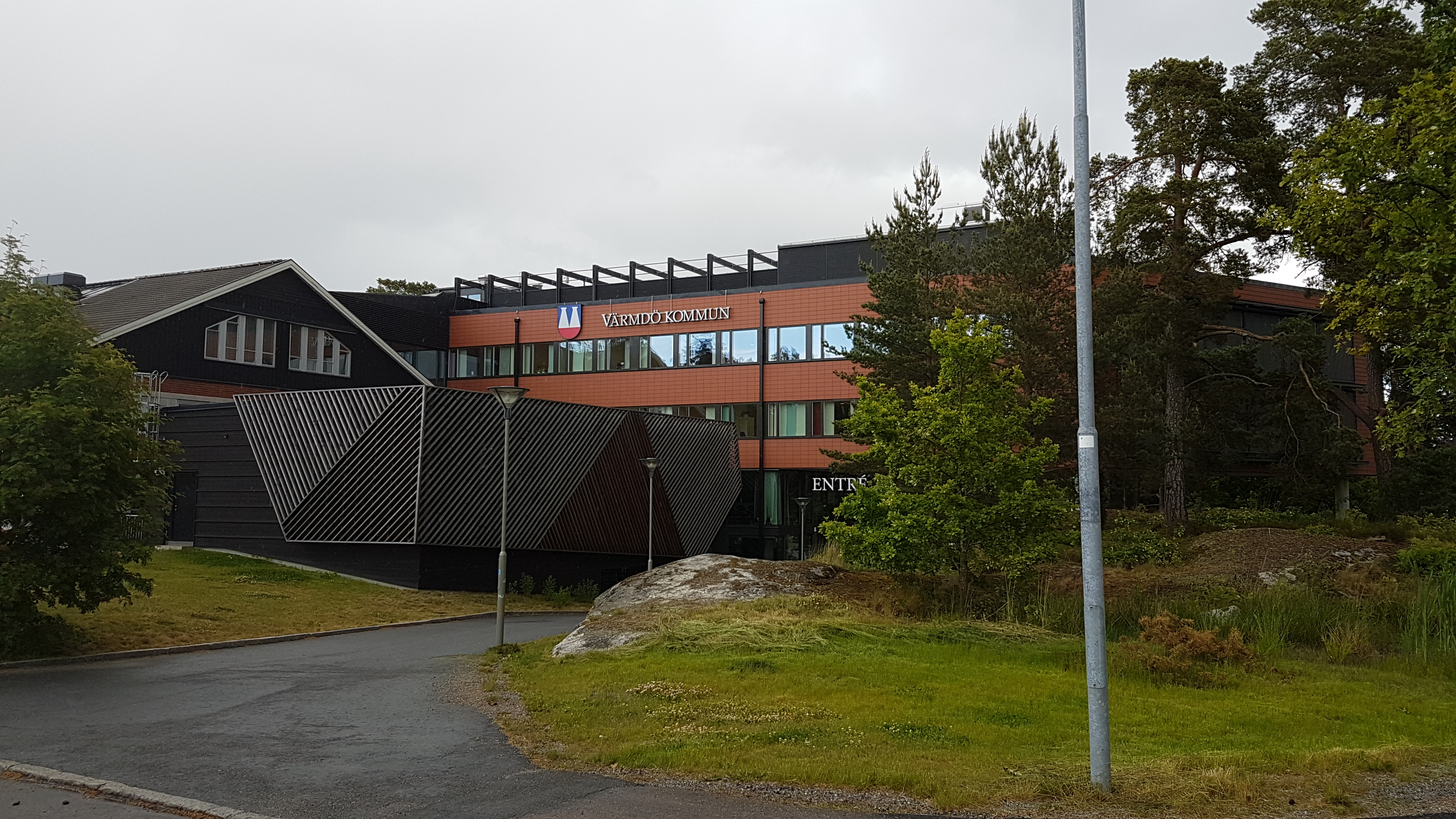 Kommunhuset i Värmdö.